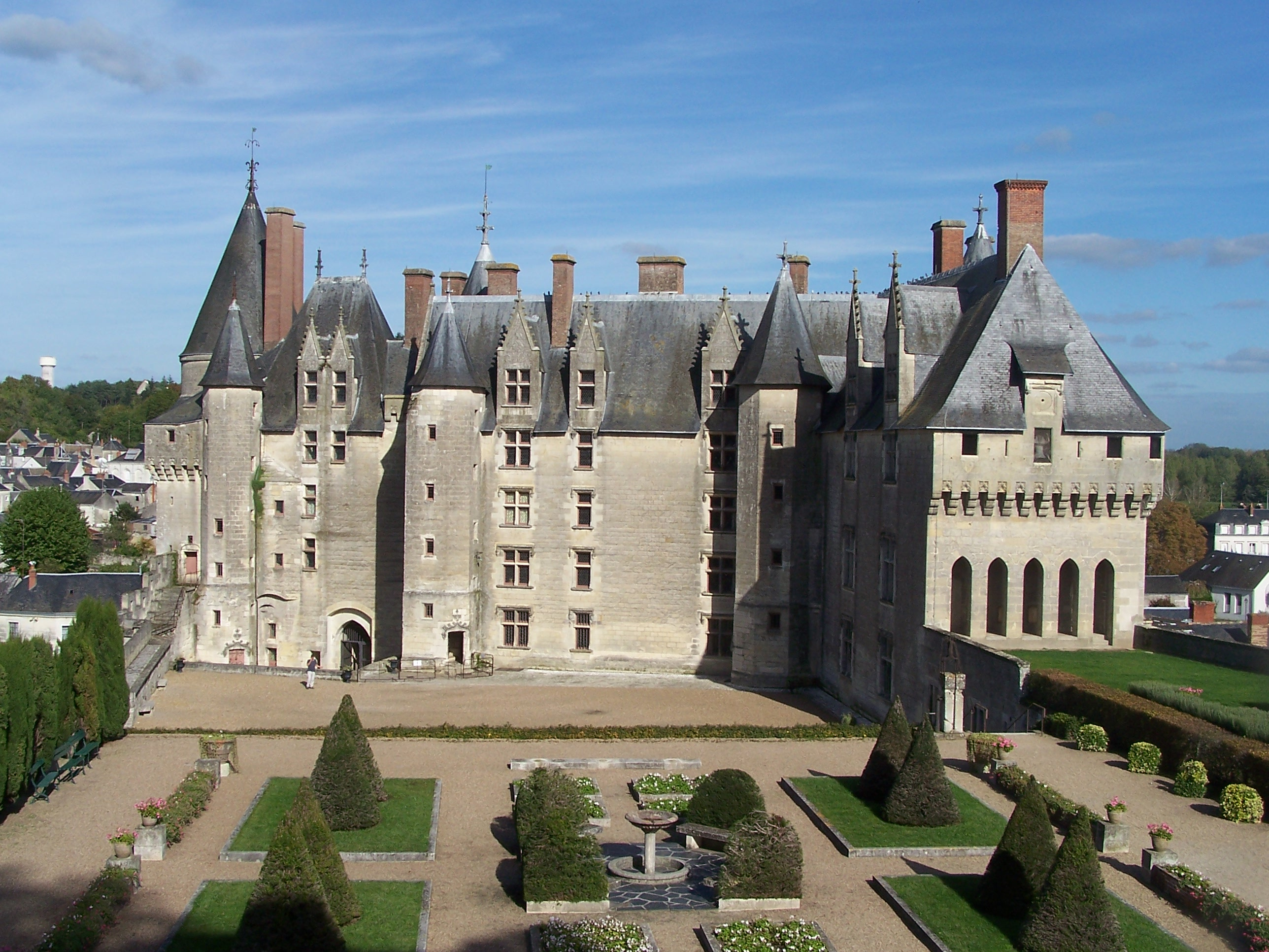 Château de Langeais